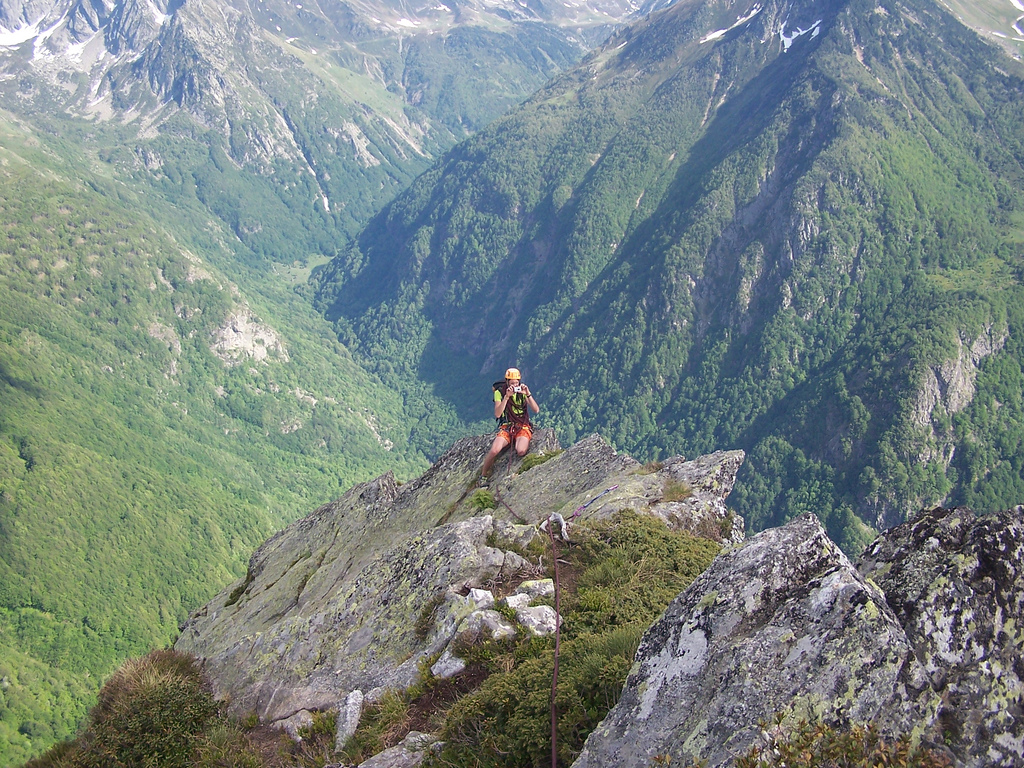 Dent d'Orlu, 2222m, Pyrénées